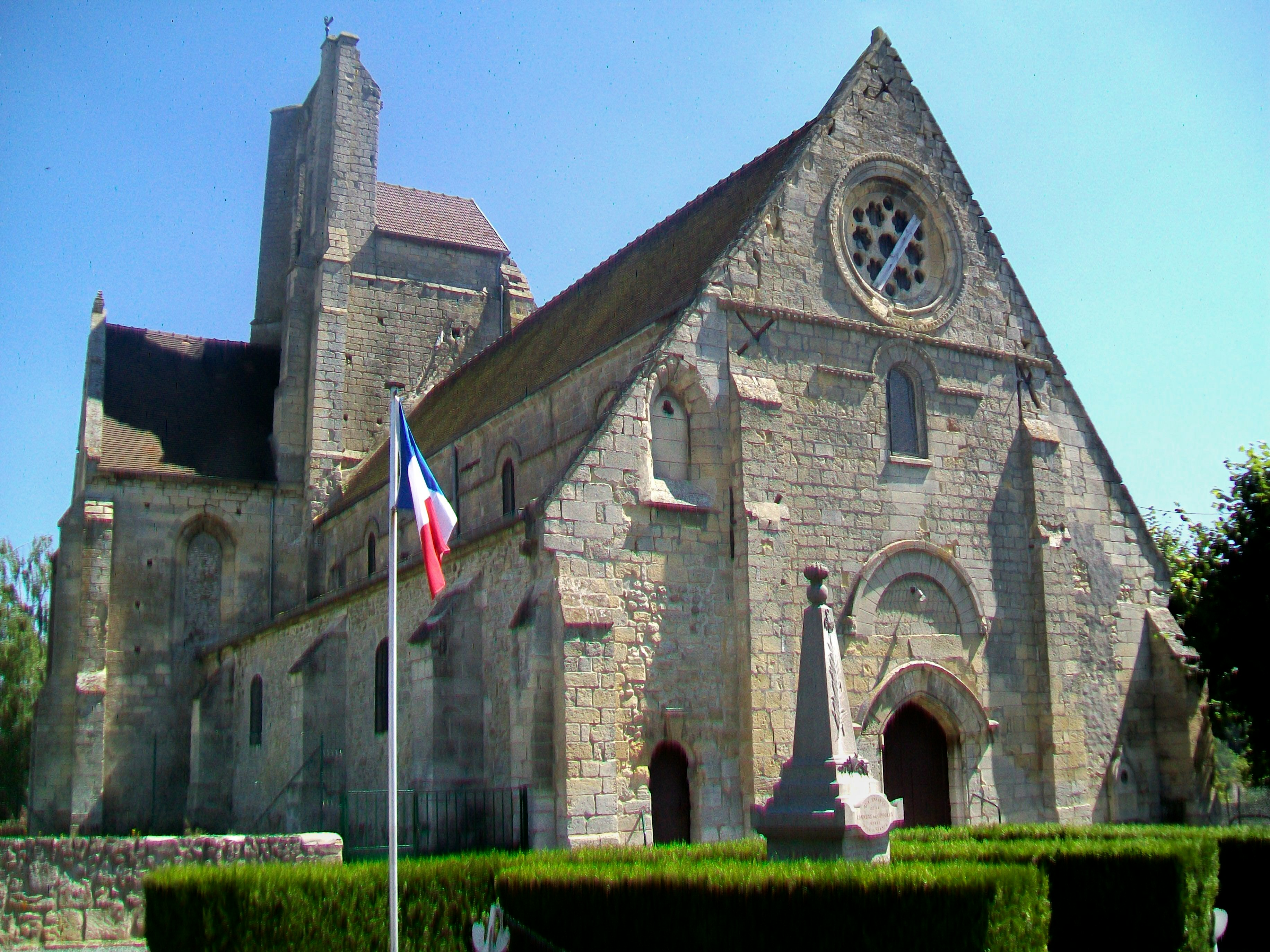 Vue d'ensemble depuis le nord-ouest.